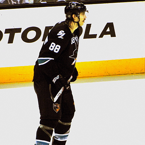 Sharks vs Wild, 11.10.11